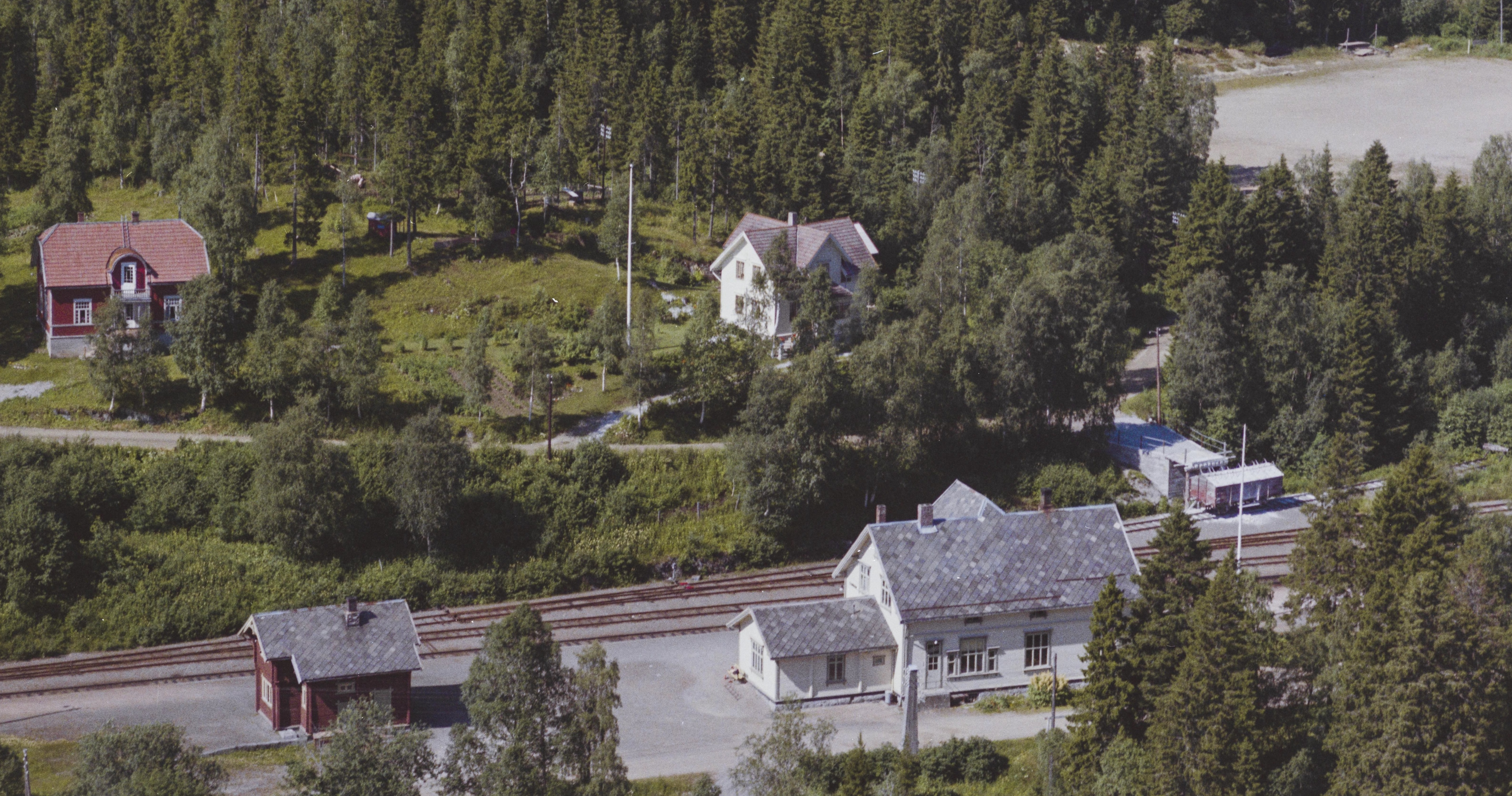 Sunnan stasjon på Nordlandsbanen. Foto: Widerøes Flyveselskap, fra Nasjonalbibliotekets samling.